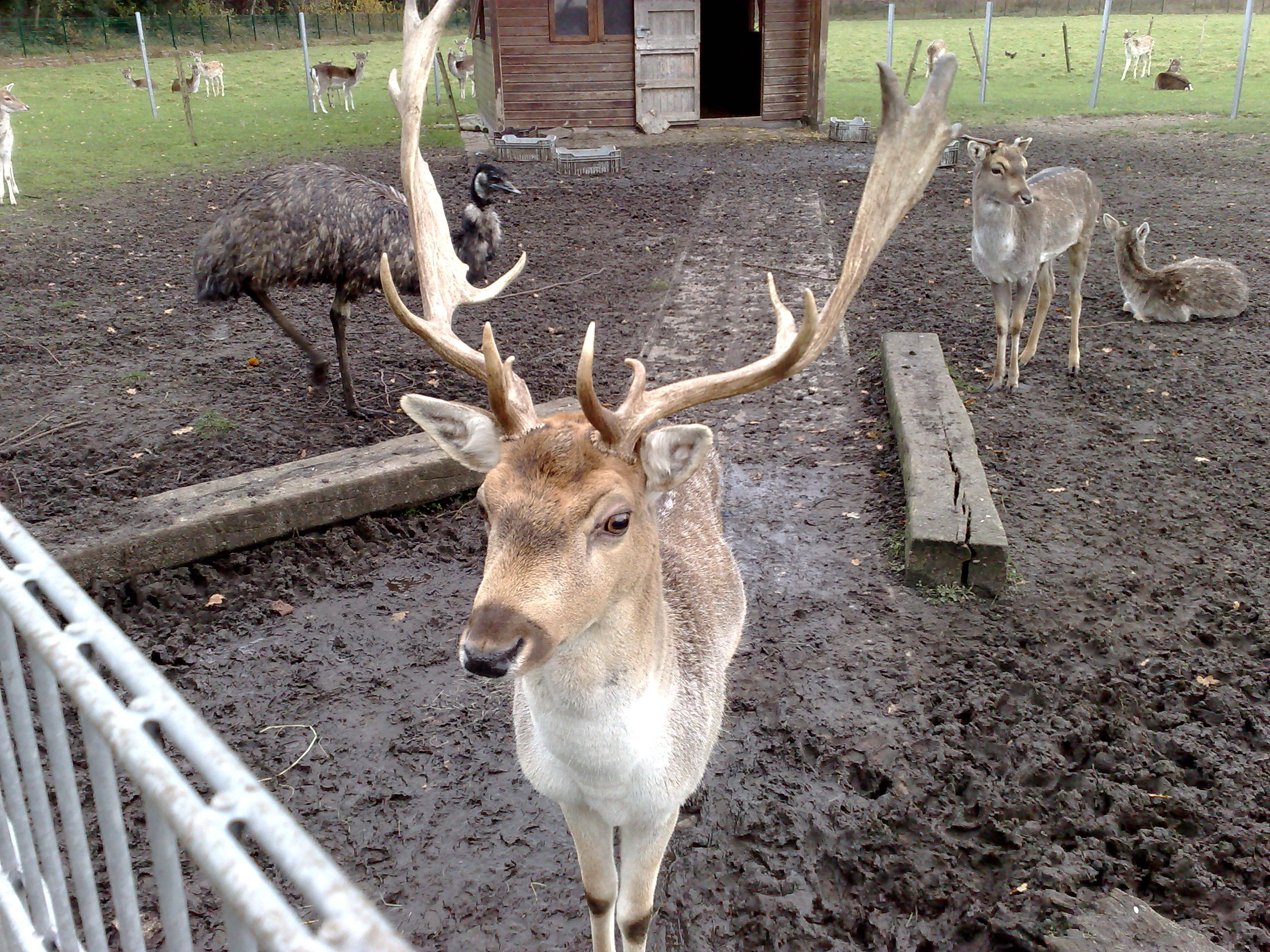 Dama dama, Dromaius novaehollandiae